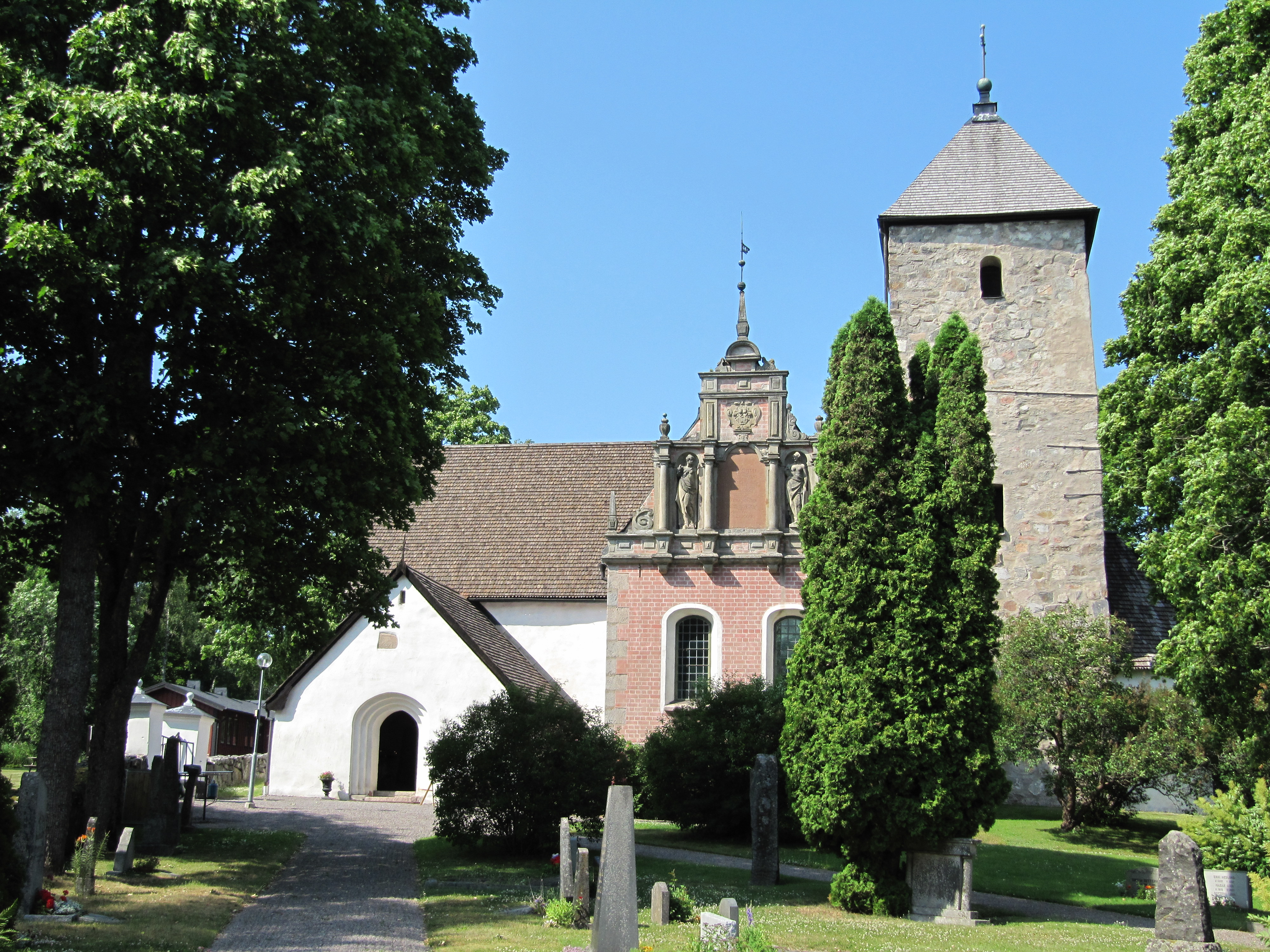 Norrsunda kyrka